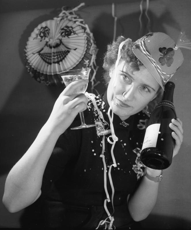 Junge Frau beim Silverstfeiern Zentralbild Prosit Neujahr [Junge Frau beim Silverstfeiern mit Sekt und Lampion]